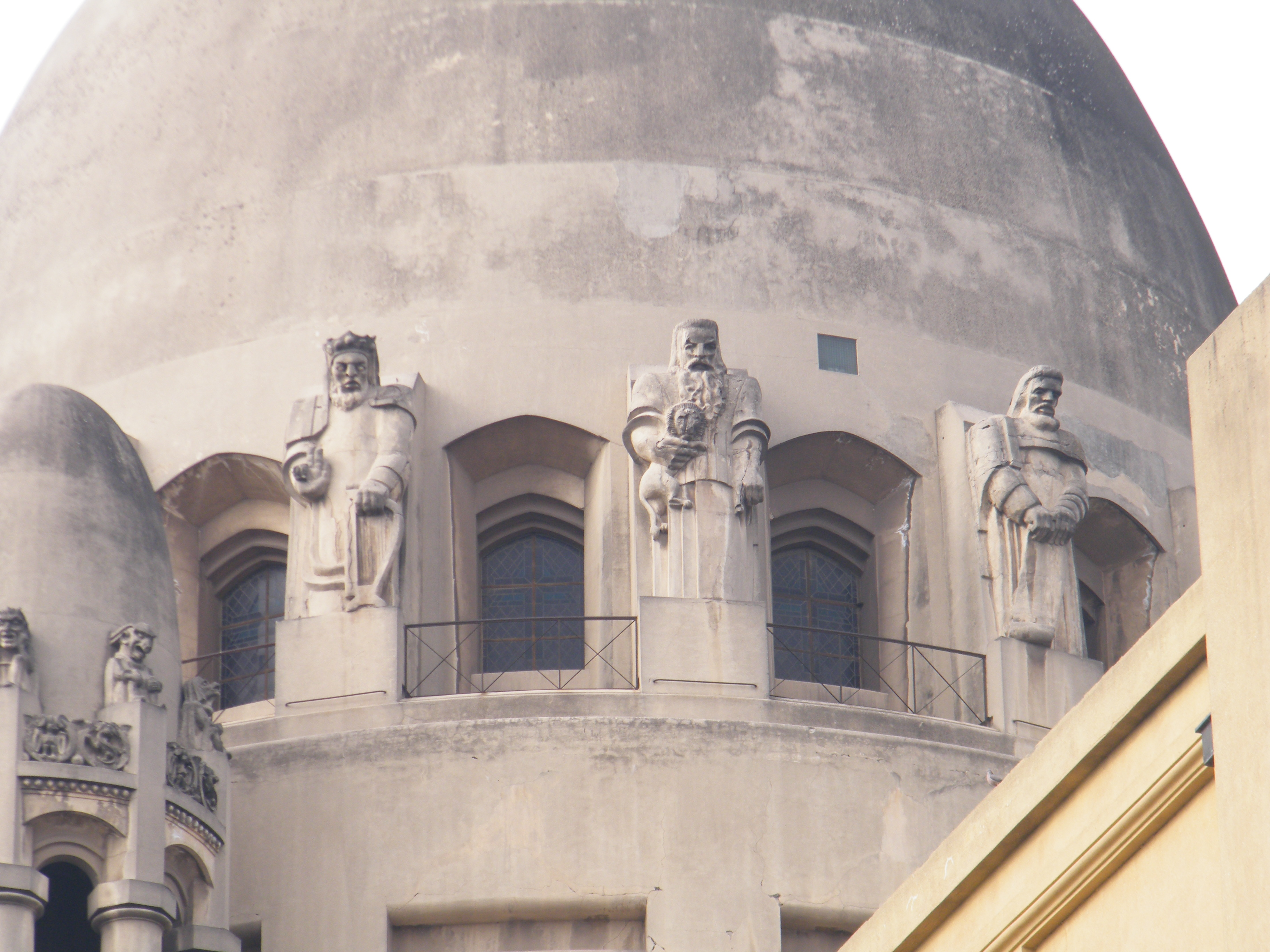 Fotografias del Santuario de Lourdes, incluyen imágenes de la Basílica, Gruta y Convento